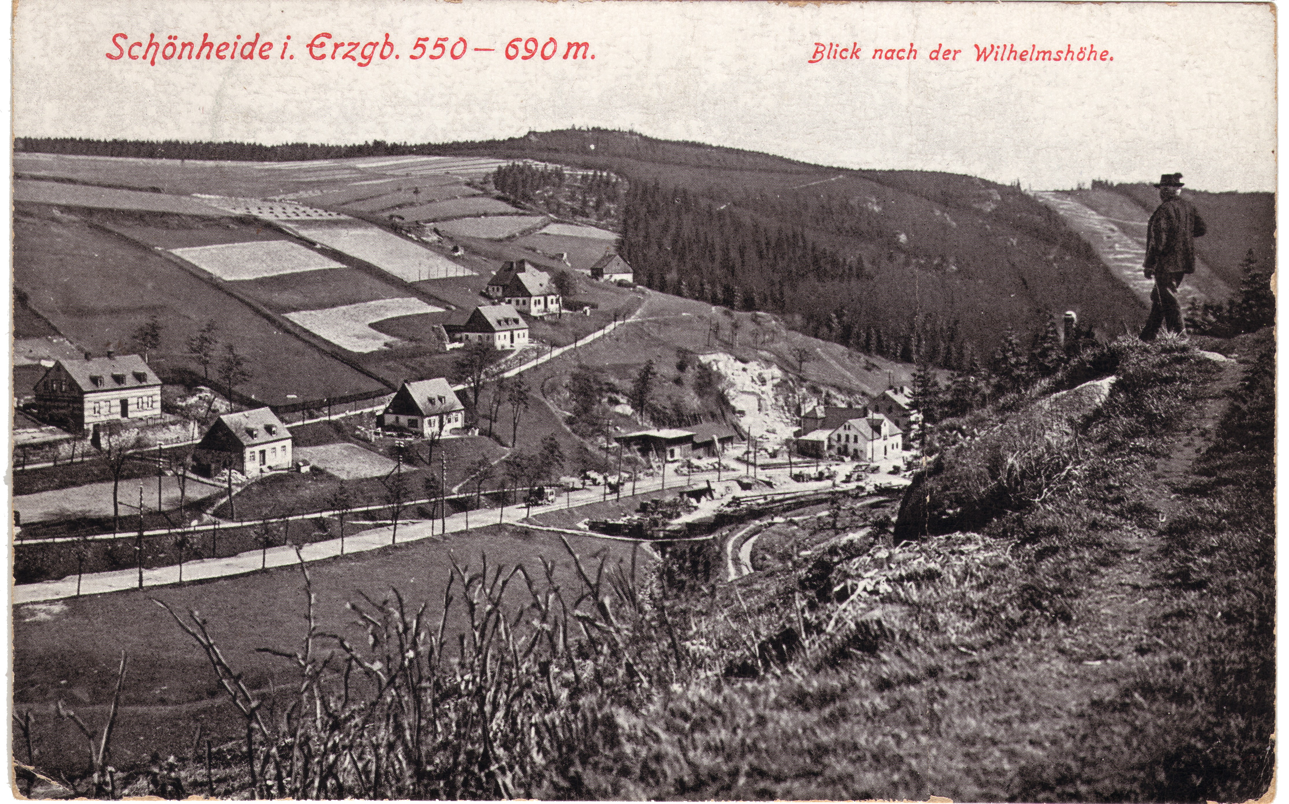 Schönheide: Blick auf Ortsteile Webersberg (links oben) und Ziegenleithe (Häuserreihe an ansteigendem Weg) sowie das Tal des Filzbachs mit nach Schönheiderhammer führender Eibenstocker Straße, Ansichtskarte von etwa 1905. Unterhalb der Häuserreihe war das Stollenmundloch des Kupferbergwerkes, das von etwa 1560 bis um 1800 betrieben wurde.